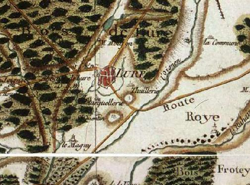 Carte crée par Cassini